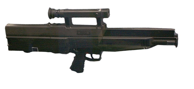 Beschreibung: Gewehr G11 / aufgenommen in der Wehrtechnischen Studiensammlung Koblenz Fotograf: Stahlkocher (Bearbeitung: Darkone)